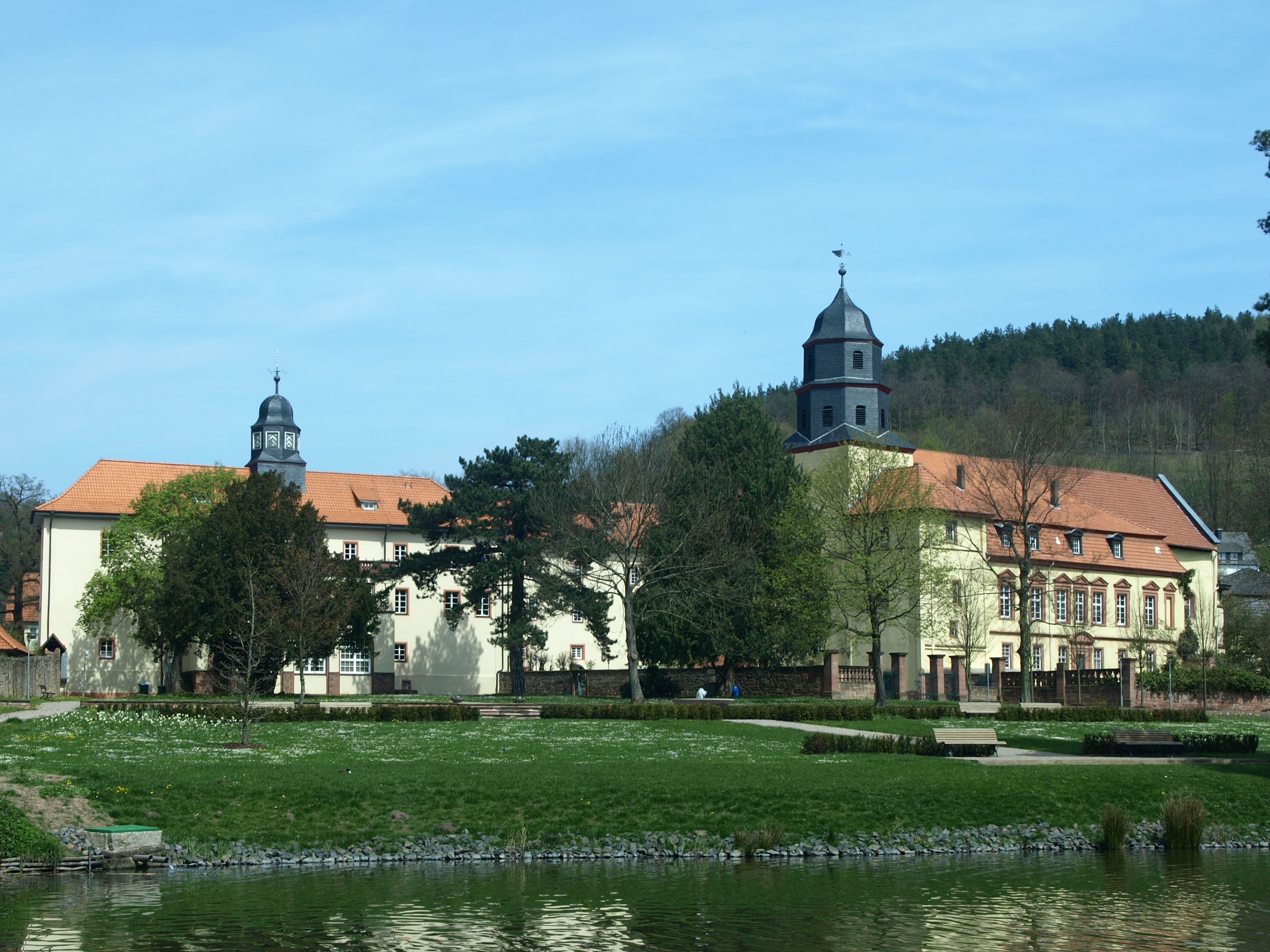 Südansicht der Schlossanlage mit Teilen des oberen Schlossparkes